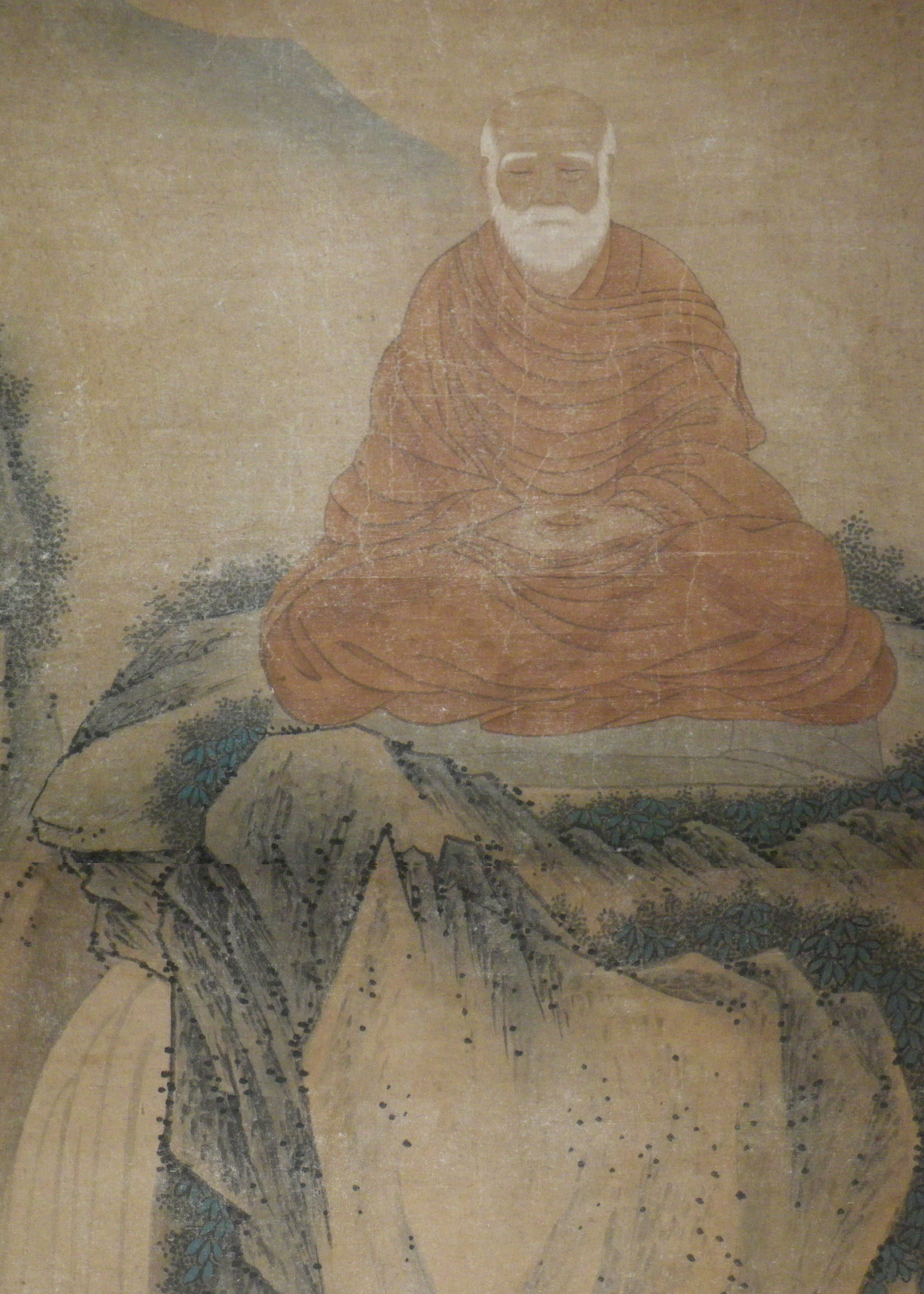 慈雲尊者の像